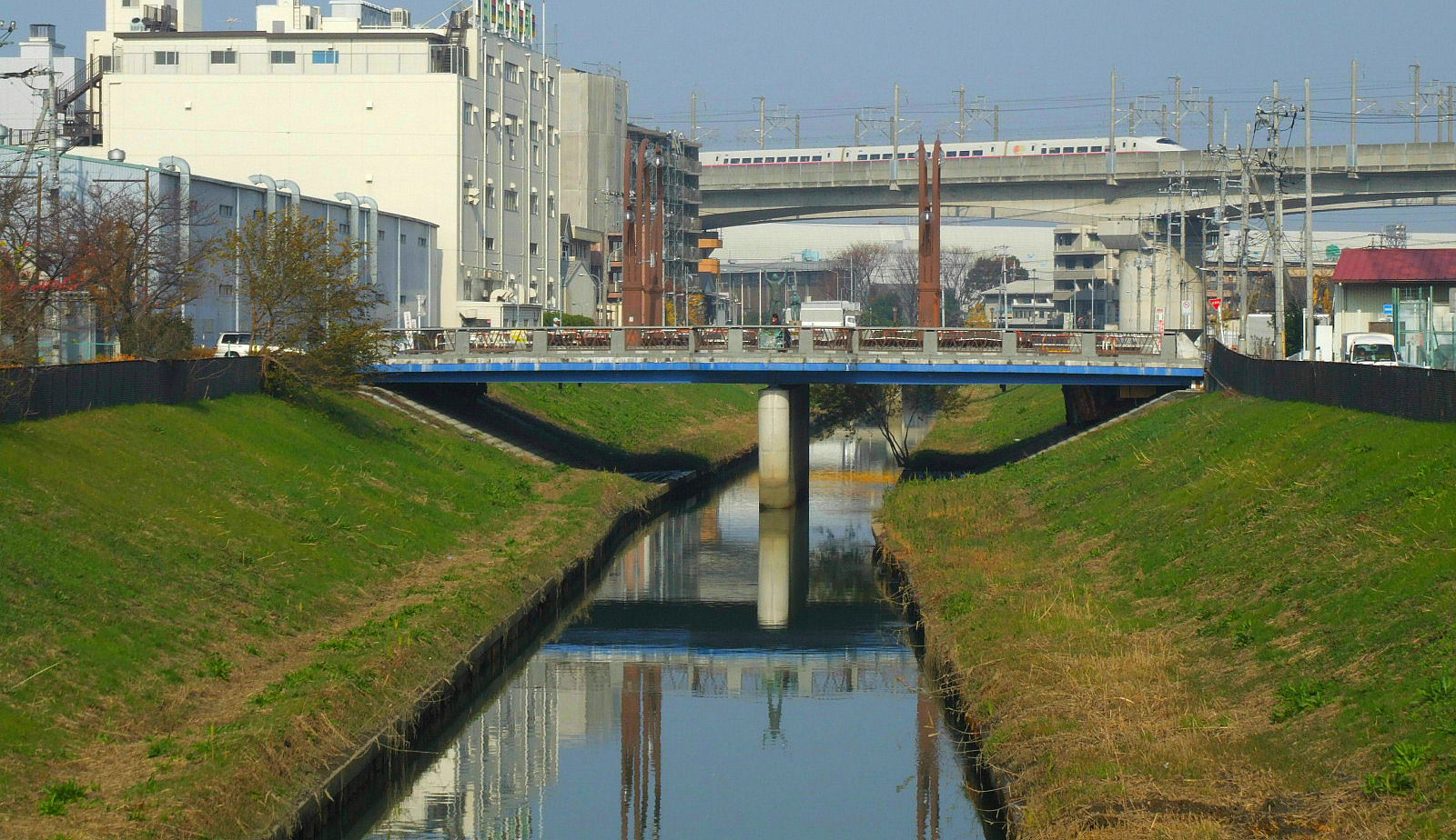 Sasame River. Toda, Saitama prefecture, Japan.